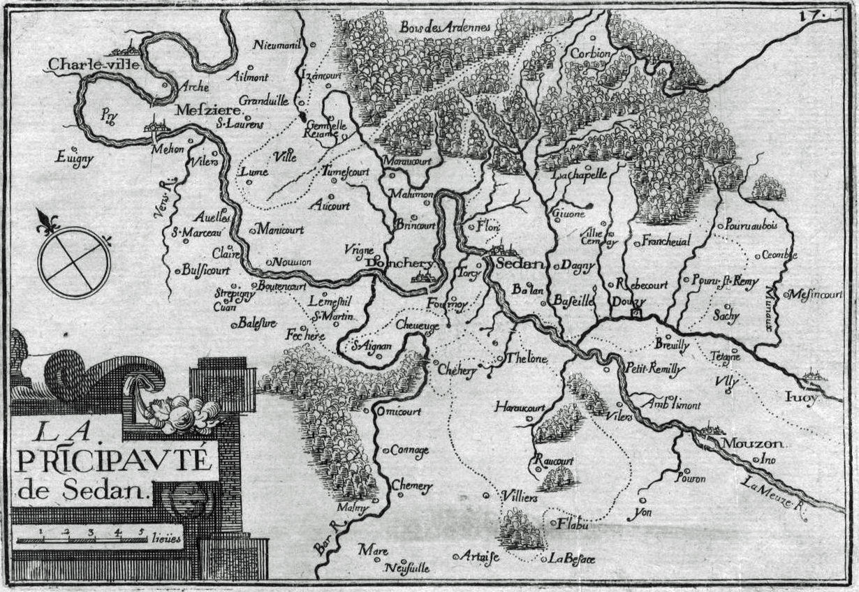 Plan de la principauté de Sedan carte de Davanne-Chappier .